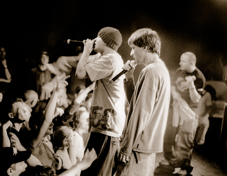 Rapper Nico Suave and Dendemann in Hamburg 2000